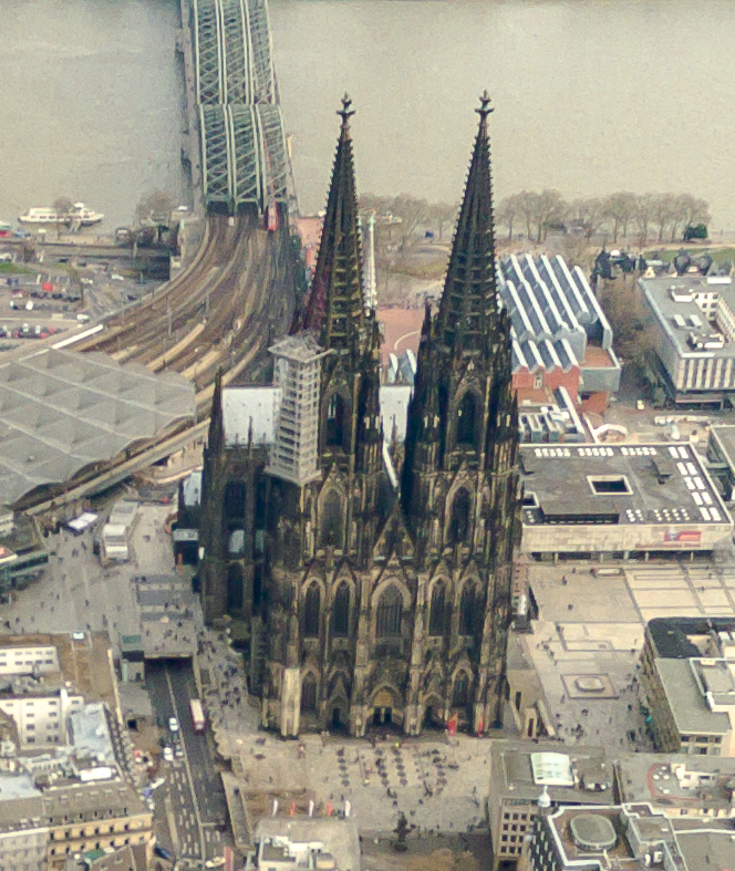 Köln ist mit mehr als einer Million Einwohnern die bevölkerungsreichste Stadt des Landes Nordrhein-Westfalen sowie die viertgrößte Kommune der Bundesrepublik Deutschland.